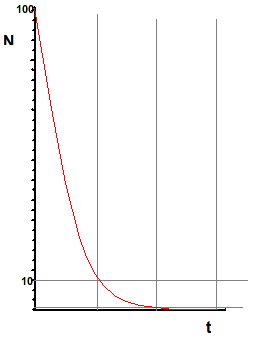 Grafico della distruzione col calore di cellule microbiche